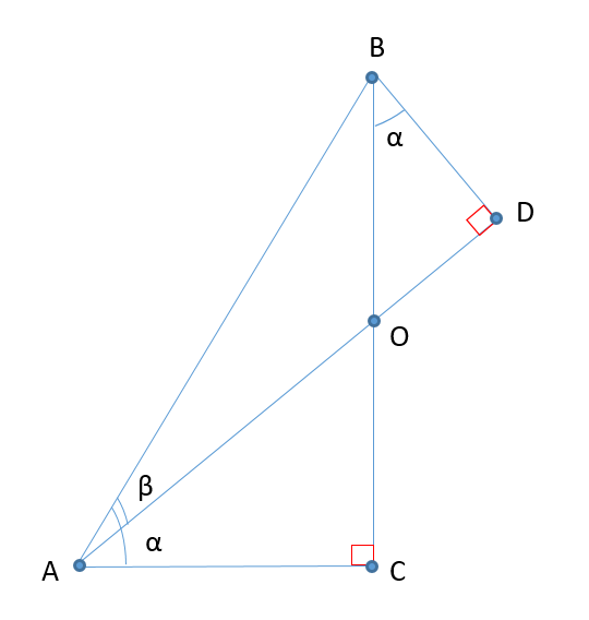 Рисунок доказательства